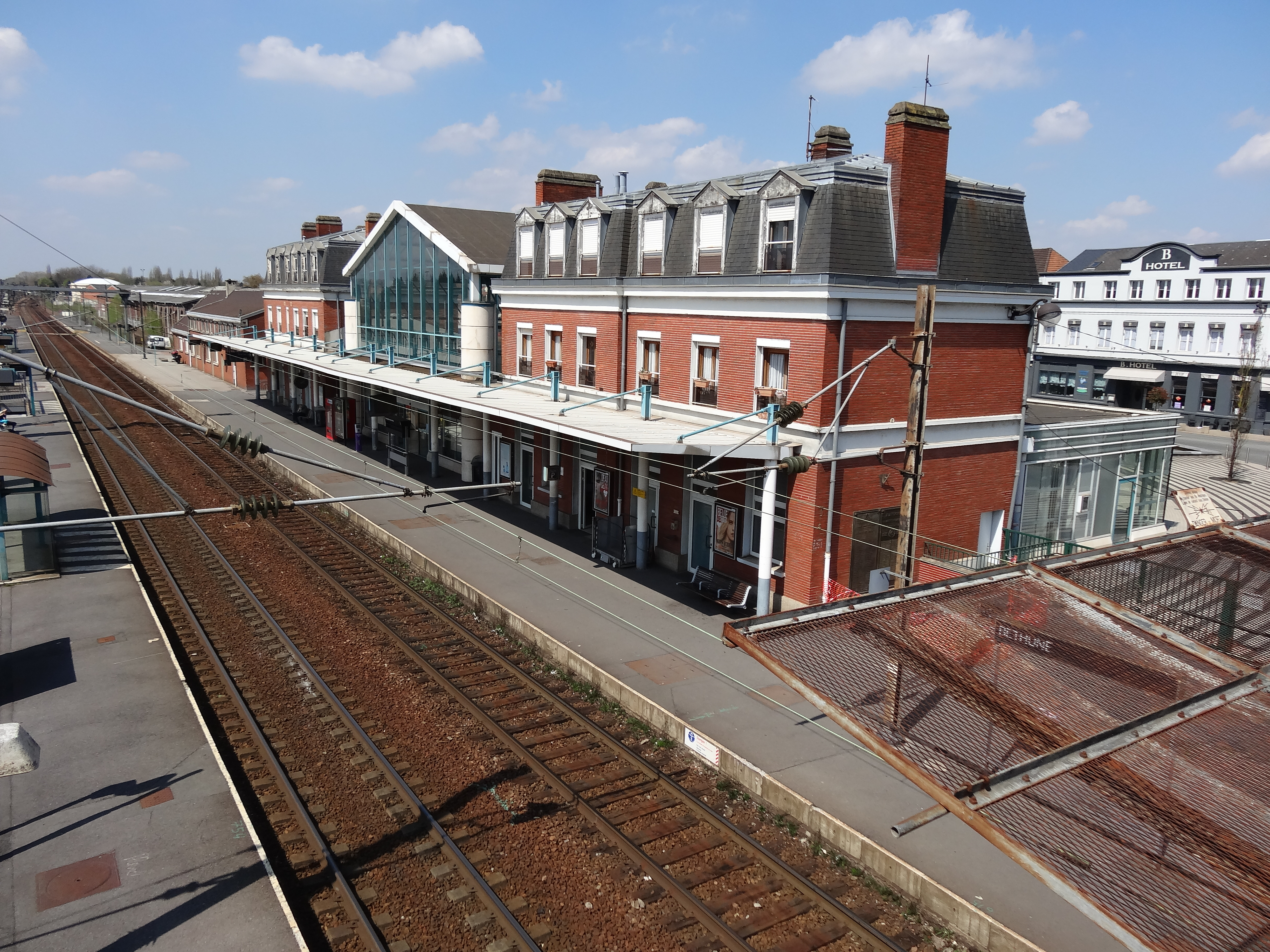 Gare de Béthune, Pas-de-Calais, Nord-Pas-de-Calais, France.